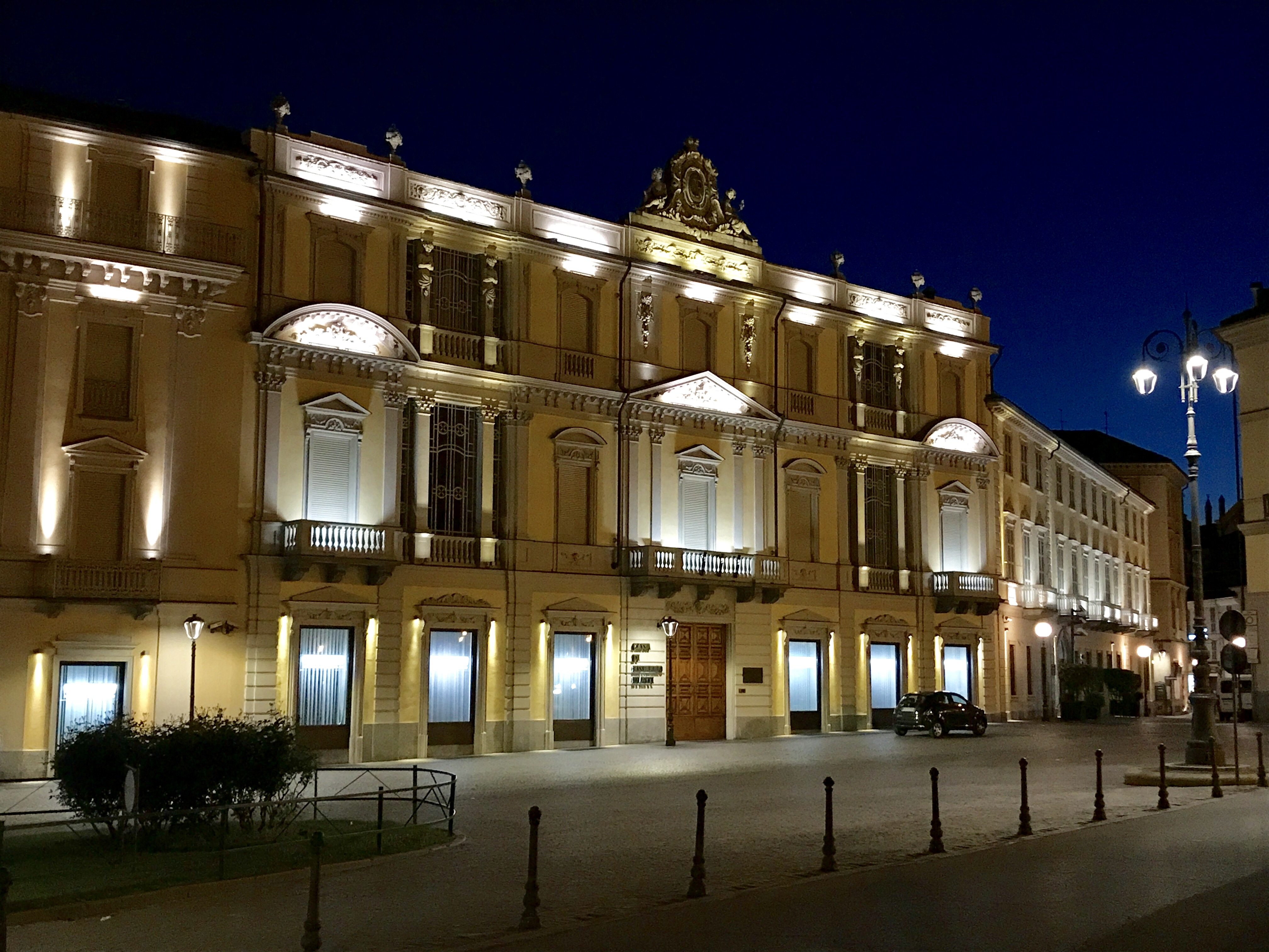 Sede della Cassa di Risparmio di Asti.